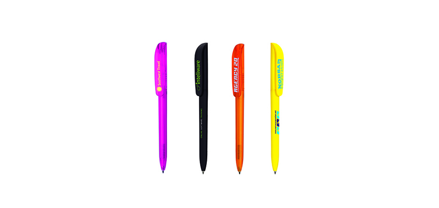 Generisk reklamegave - kuglepen med logo